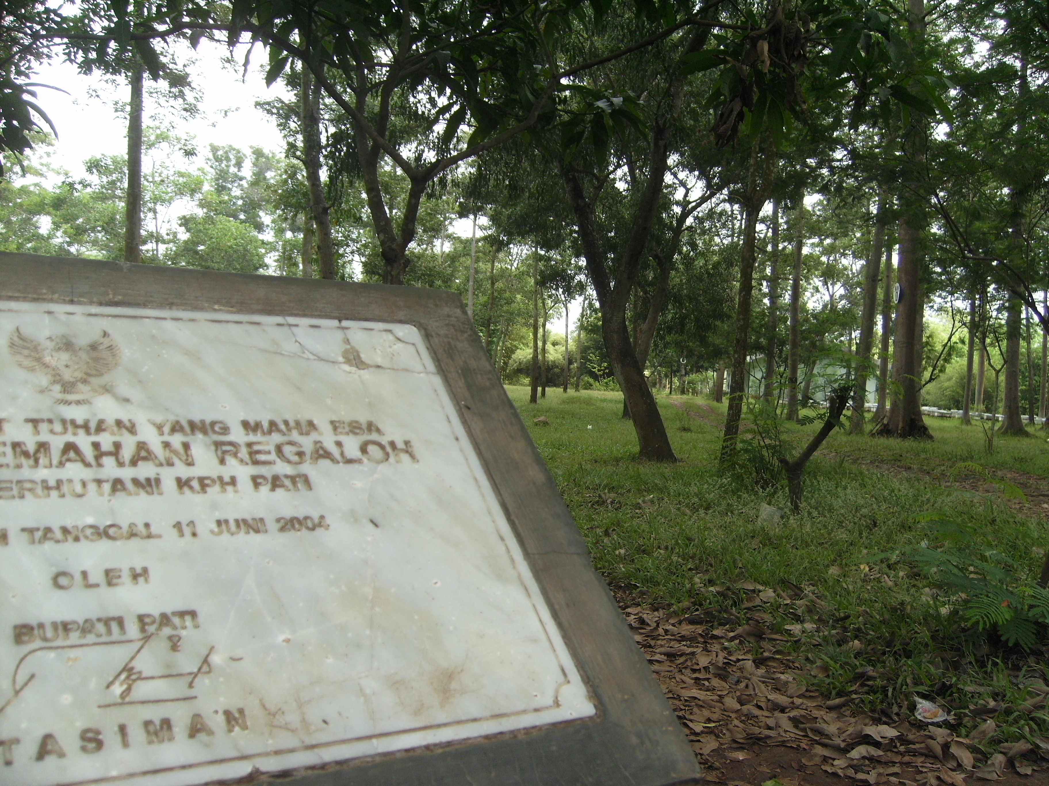 Bumi Perkemahan Agrosilvo Regaloh Tlogowungu Kabupaten Pati